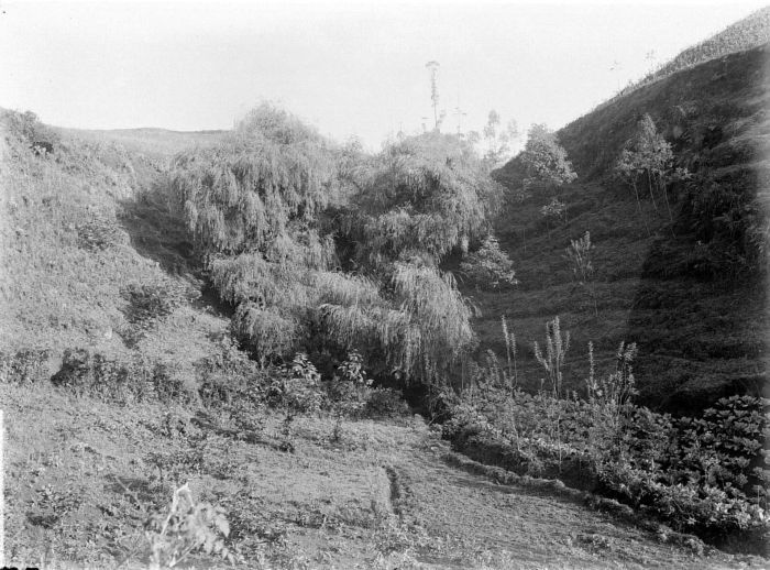 Repronegatief. Bron van de Serajoe op de Dieng met treurwilgen